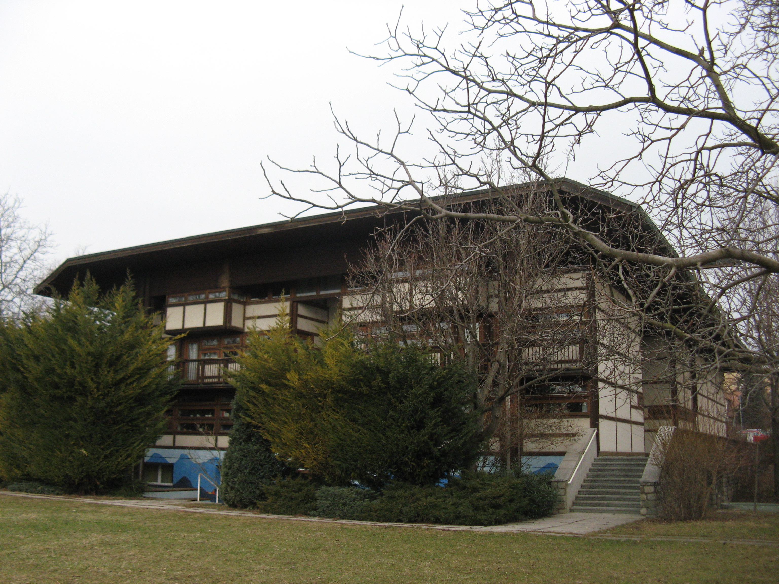 Pfarrkirche Salvator am Wienerfeld (1978-79) von Johannes Spalt, Neilreichgasse 143, Wien-Favoriten